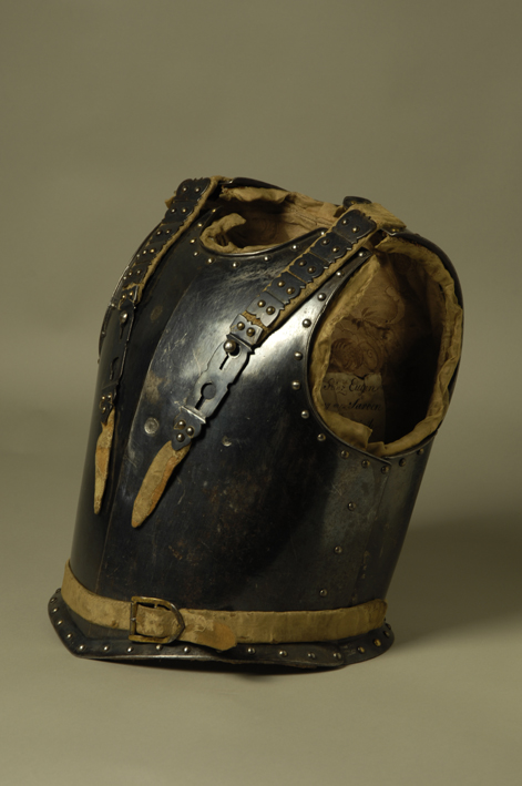 Kürass des Prinzen Eugen von Savoyen Heeresgeschichtliches Museum Native nameHeeresgeschichtliches MuseumParent institutionMinistry of DefenceLocationViennaCoordinates48° 11′ 07.3″ N, 16° 23′ 14.6″ E Established1856Web page control : Q700751 VIAF: 149726120 ISNI: 0000 0001 2182 8171 LCCN: n50055593 OSM: 4465113 GND: 2006452-4 WorldCat institution QS:P195,Q700751